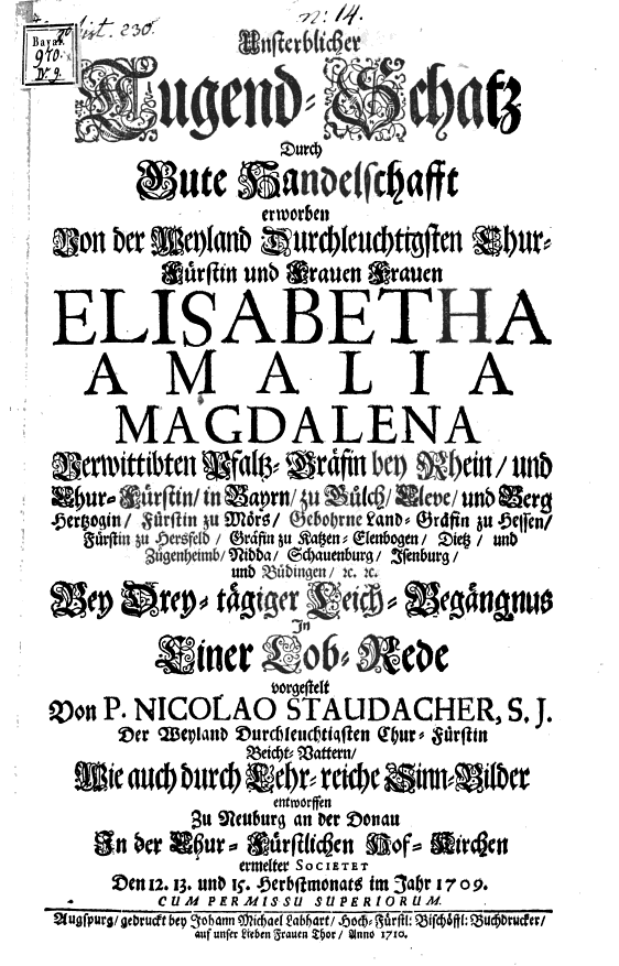 Buchtitelblatt Nikolaus Staudacher, Jesuit (1660-1736) Beichtvater und Berater des Pfälzer Kurfürsten Karl III. Philipp